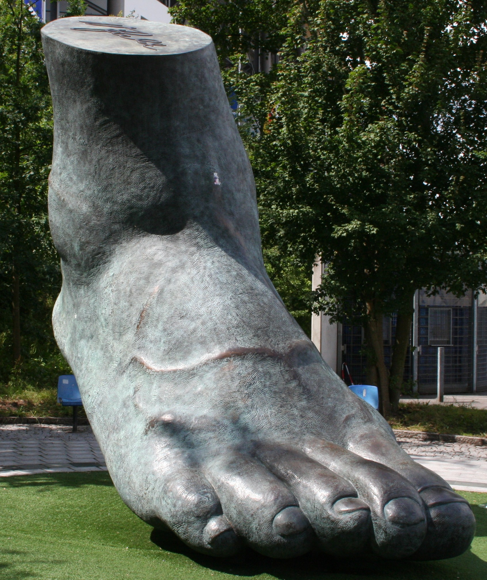 Uwe Seeler zu Ehren wurde vor dem Stadion eine Skulptur seines rechten Fußes errichtet.